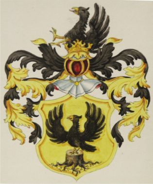 Familienwappen aus den genealogischen Registern der Stadt Schaffhausen, angelegt von Hans Wilhelm Harder (1810–1872), 10. Band (Sp–St) Familie Stokar von Neuforn